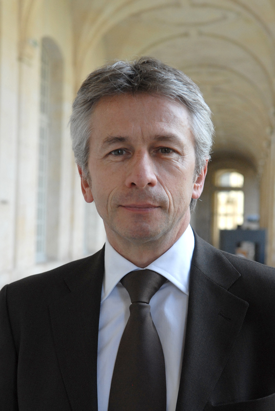 Laurent Beauvais, président du conseil régional de Basse-Normandie, en mars 2010.